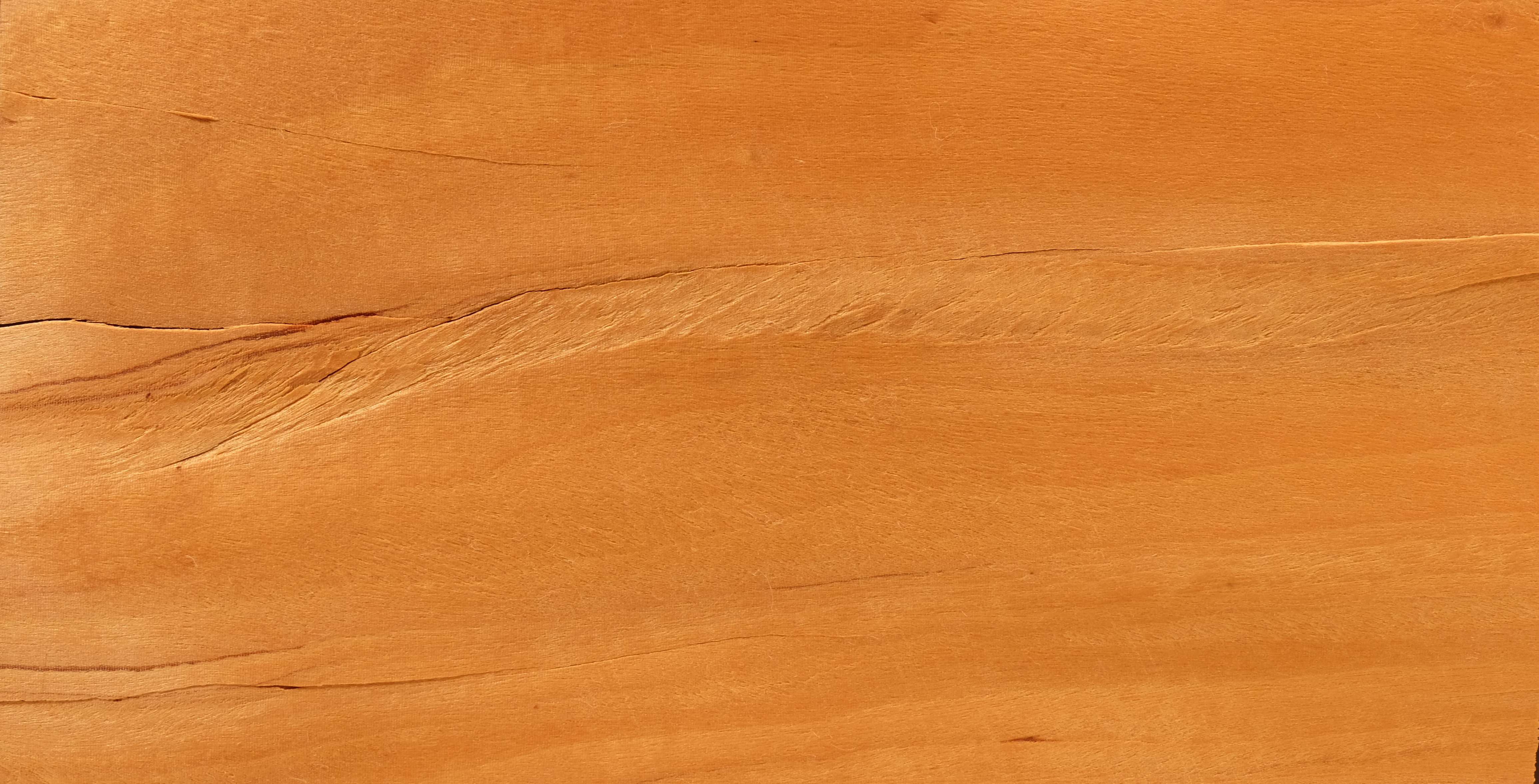 gemessertes Furnier; Holzart: SAO, Ostindisches Satinholz, Zitronenholz, Citronnier